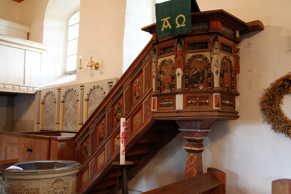 Kanzel in der Wallrodaer Kirche